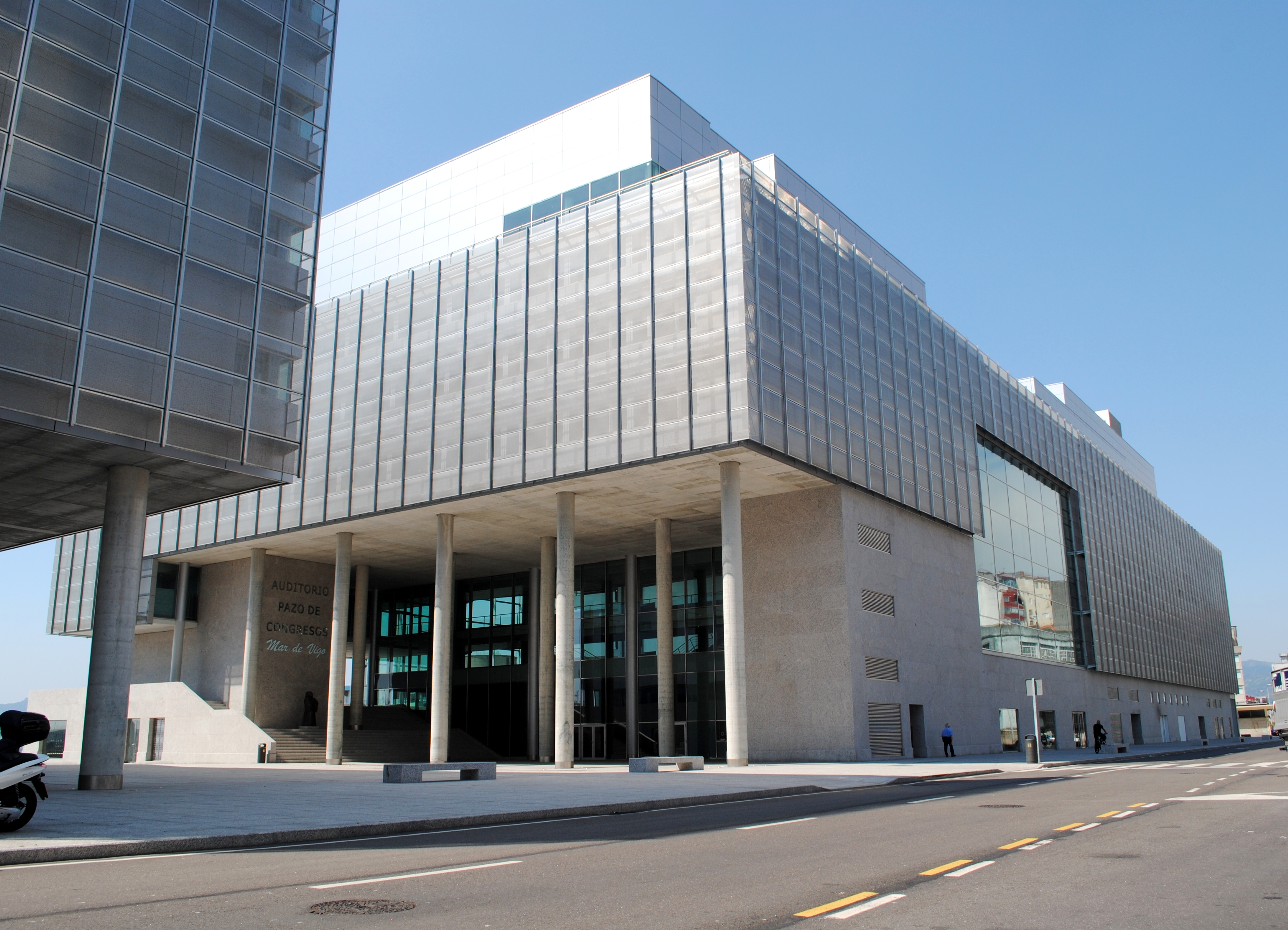 Auditorio Pazo de Congresos Mar de Vigo, 2011, Vigo.